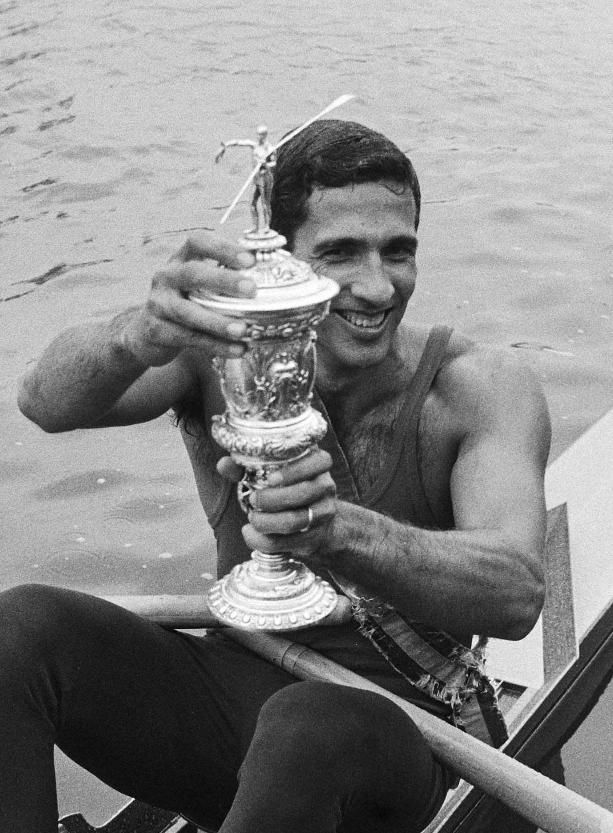 Roeien, Holland Beker op de Bosbaan; Ricardo Ibarra met zijn prijs in zijn boot